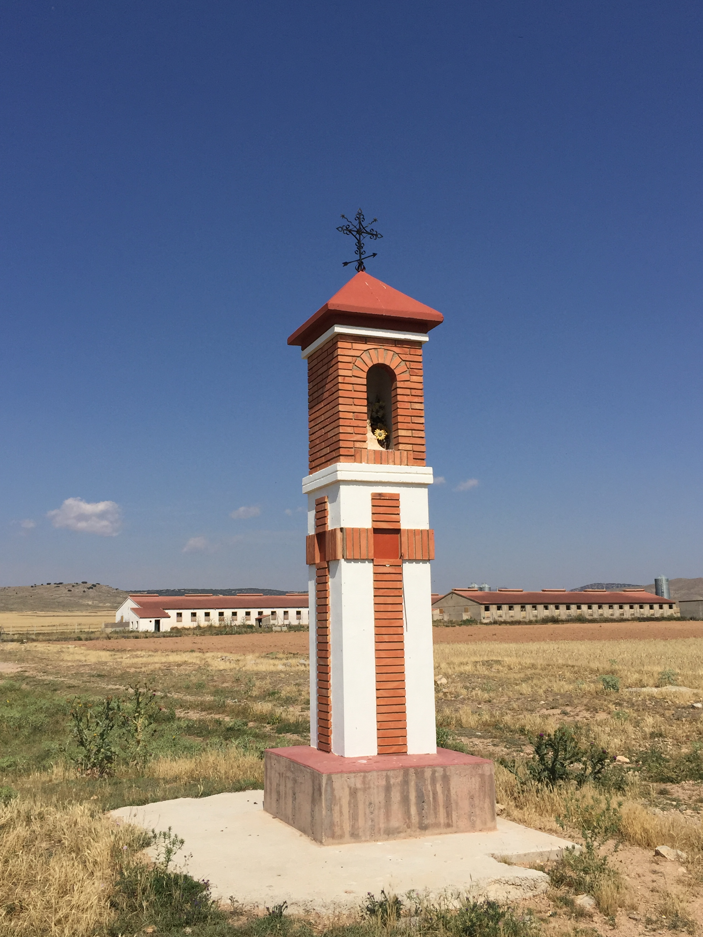 Peirón de la Virgen del Pilar Cruz de Término o Humilladero Santa Eulalia del Campo (Teruel)